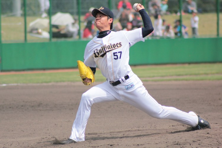 山田修義（2012.04.29）